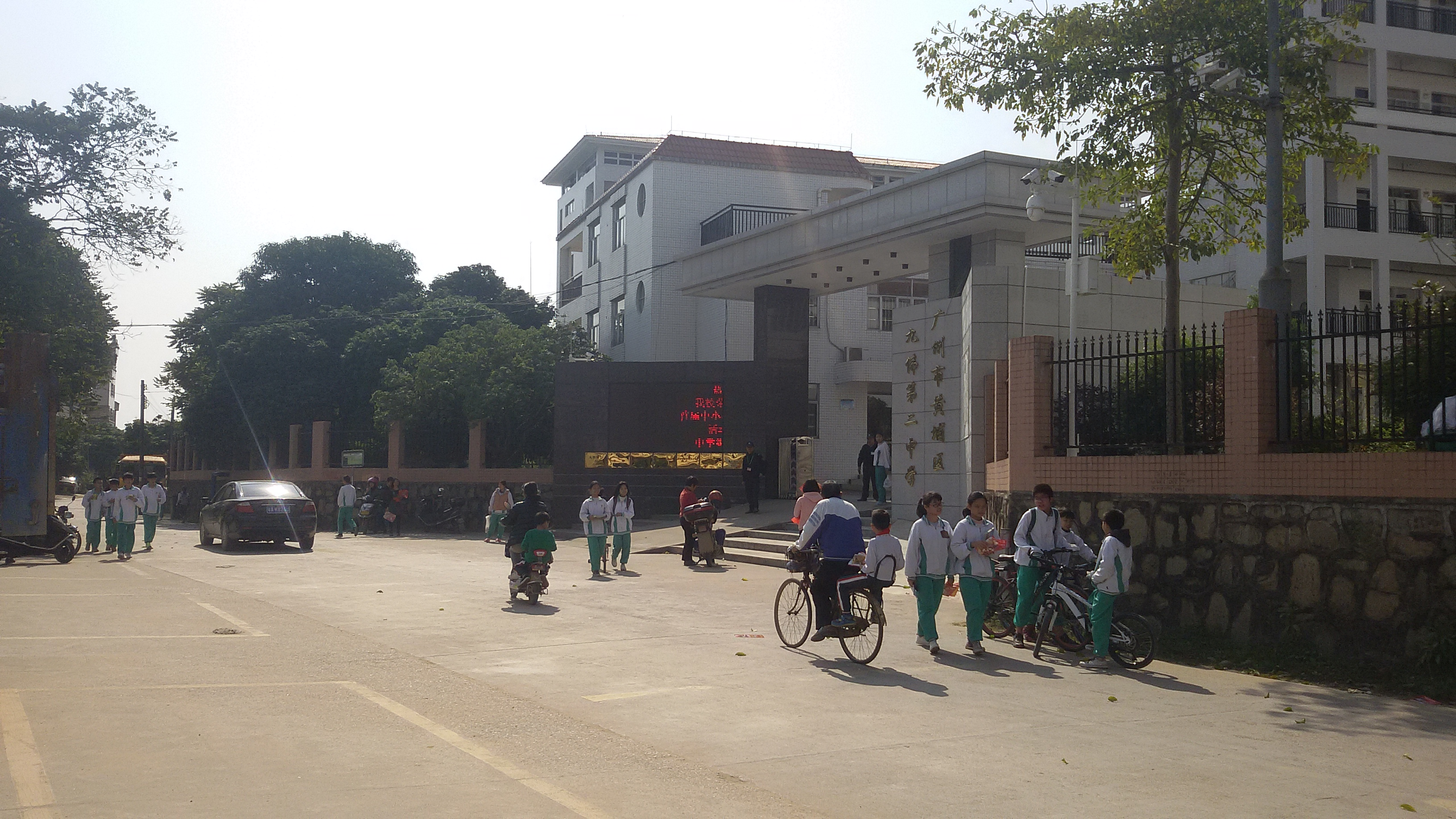 粵語: 九佛第二中學